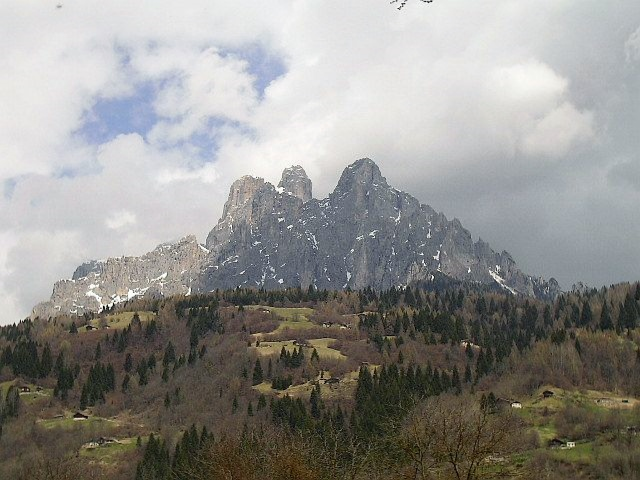 Foto scattata da me medesimo il 17 aprile 2006. Nella veduta, ripresa da Transacqua, si distingue il Col di Cistri (1602 m), mentre le montagne che si vedono fanno parte del gruppo del Sass Maòr, e siìono, nell'ordine (da dx a sx): il Cimerlo (2503 m), la Cima della Madonna (2752 m), la Cima della Stanga (2550m), mentre a sx il Cadinoi che digrada da un'altezza max di 2367 m.